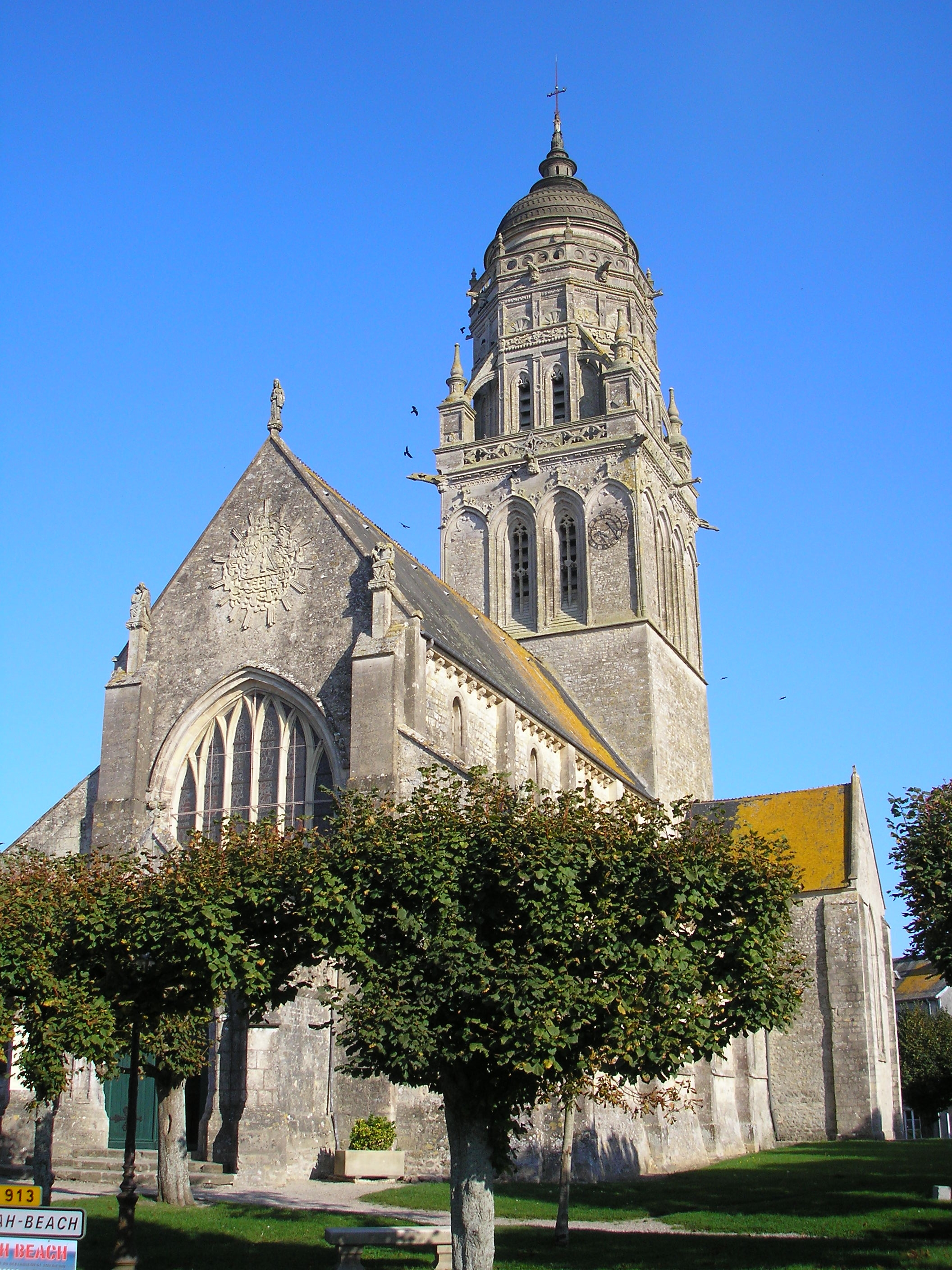 Sainte-Marie-du-Mont (Normandie, France). L'église Notre-Dame-de-l'Assomption.